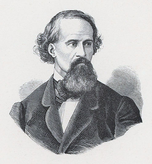 Filippo De Boni